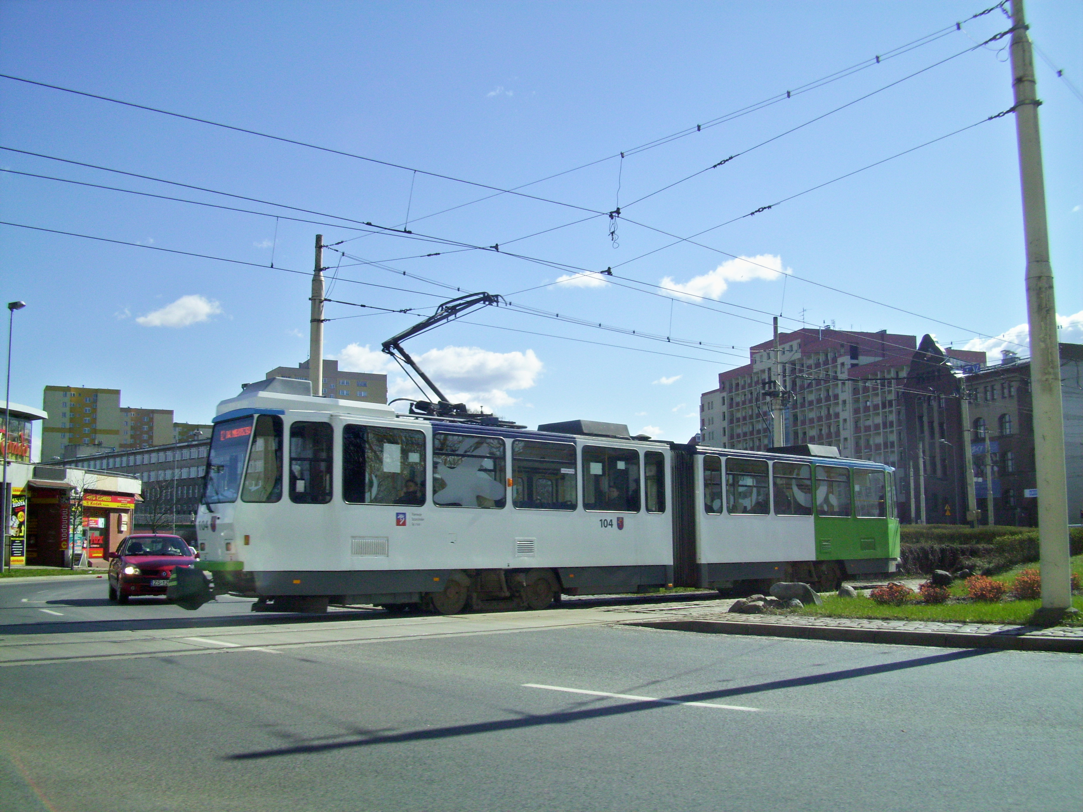 Tatra KT4Dt z apataturą Woltanu